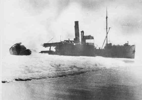 SS Ferrett